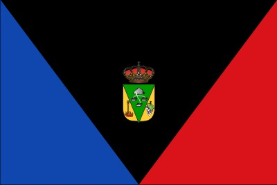 Bandera del Municipio Palmero de Fuencaliente de La Palma